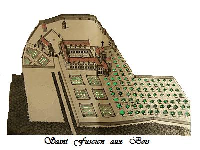 Abbaye de Saint-Fuscien d'après planche monasticon (détail colorié)